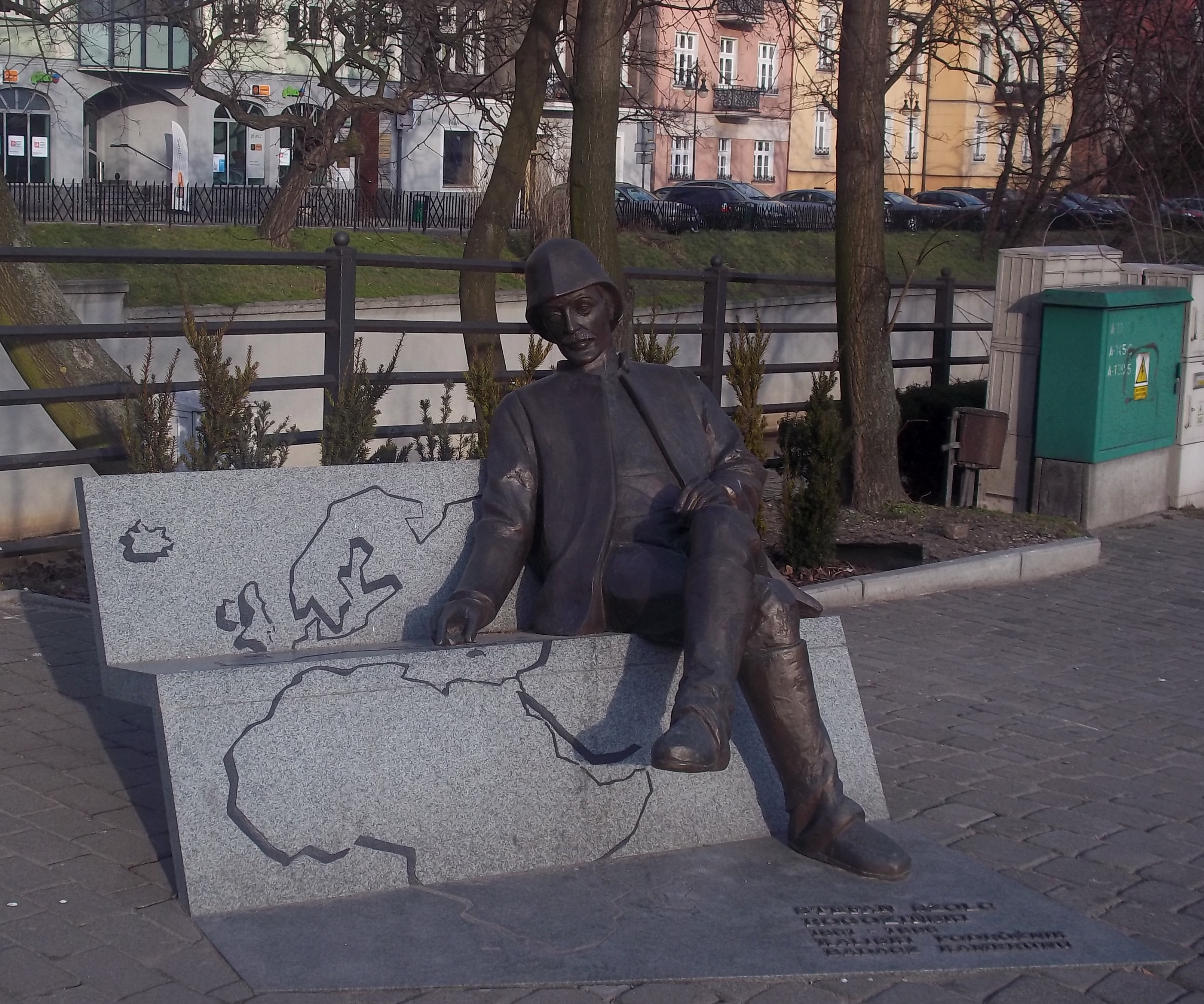 Pomnik Stefana Szolc-Rogozińskiego przy Moście Kamiennym w Kaliszu